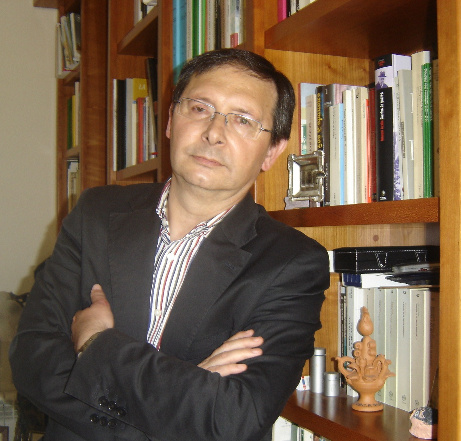 Antonio Lara Ramos en Granada (2012)